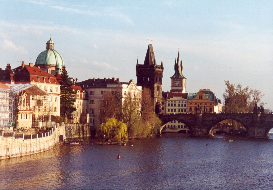 Zicht op Praag. Categorie:Afbeelding stadsgezicht